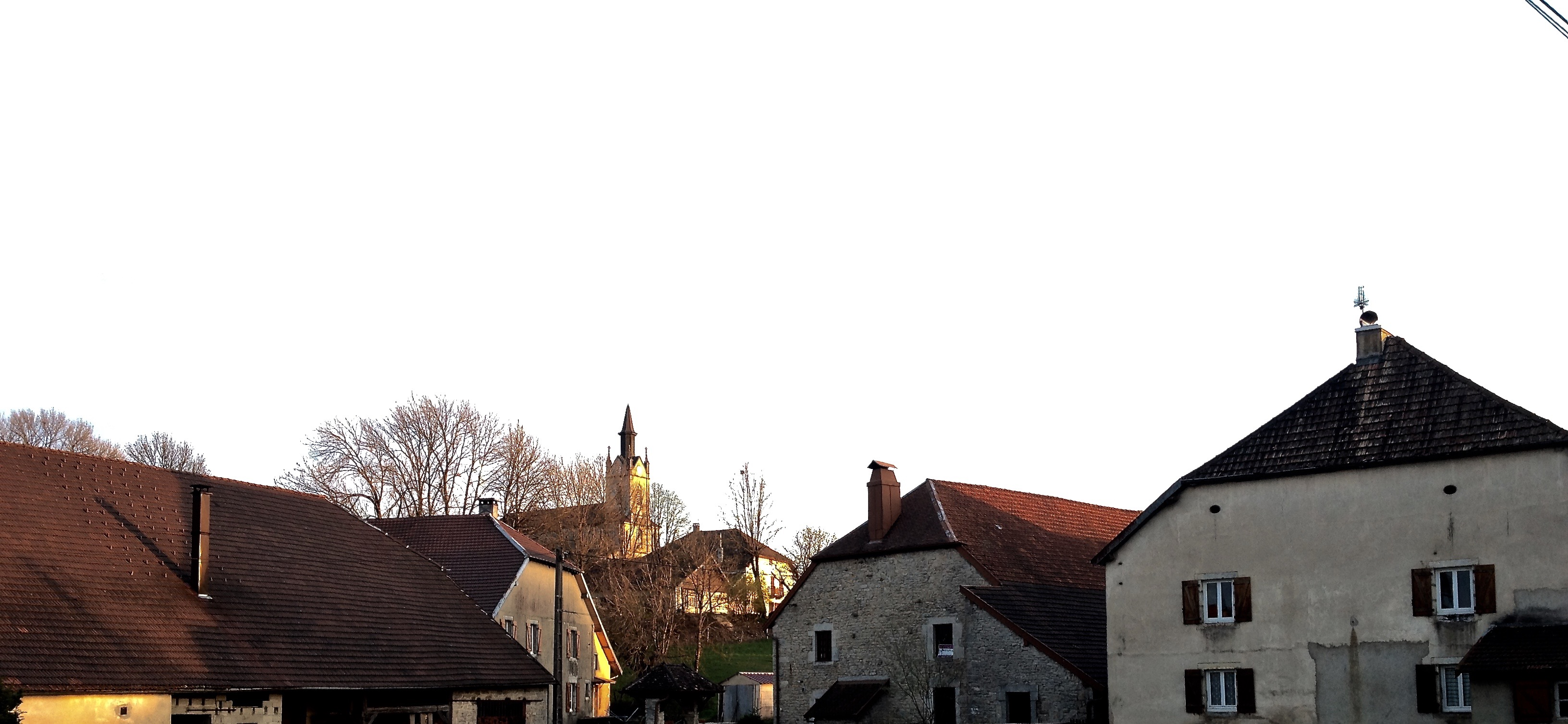 Vue depuis le croisement de la rue de Salins et de la rue Pasteur